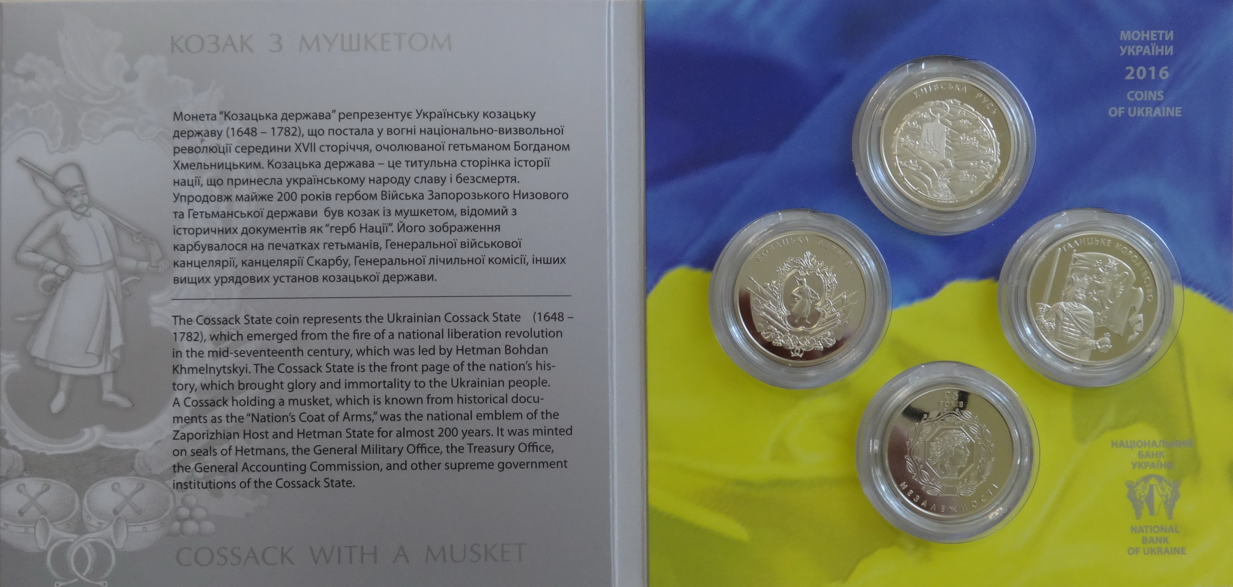 Набір монет НБУ «25 років незалежності України». Третій розворот.